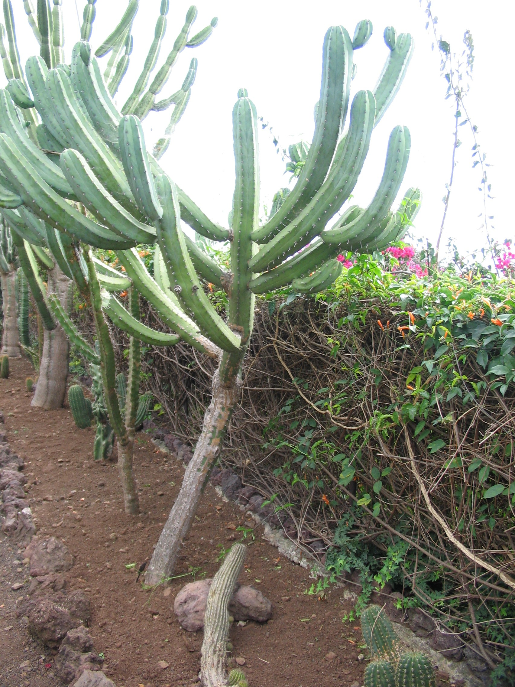 Myrtillocactus geometrizans (botanikus kert, Funchal)